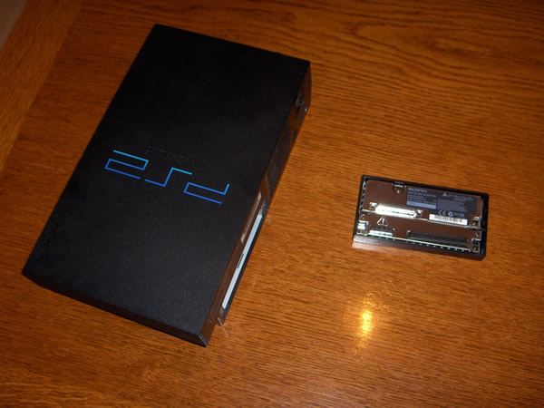 PlayStation 2 console met losgekoppelde Netwerk Adapter, zelfgemaakte foto, GFDL